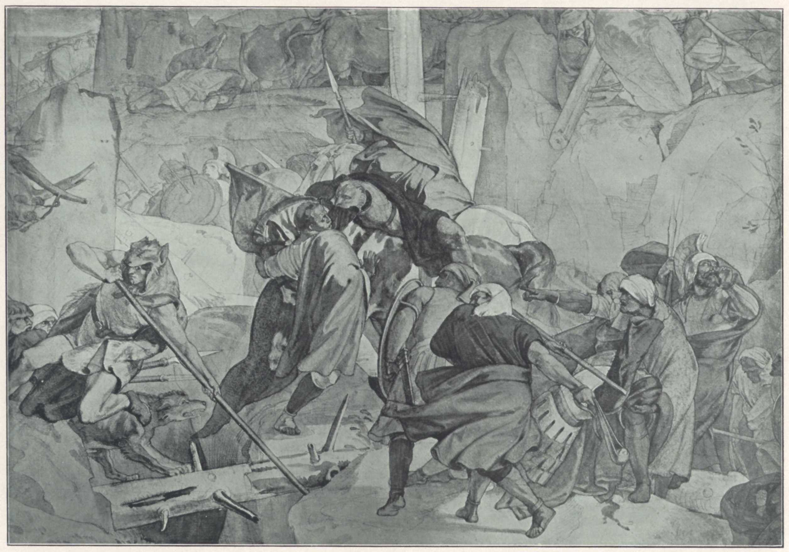 3. Kampf mit den Älplern (lt. Quelle) Bildbeschreibung im Artikel Alfred Rethel in der ADB: 3) Gefahren und Strapazen des Heeres bei seinem durch Angriffe der Helvetier erschwerten Marsche über die stürmischen Alpenpässe.Blatt 1 Blatt 2 Blatt 3 Blatt 4 Blatt 5 Blatt 6 der Serie